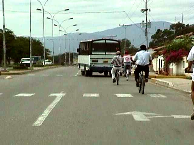 Avenida Circumvalacion 2 El Tocuyo, estado Lara - Venezuela (1999)